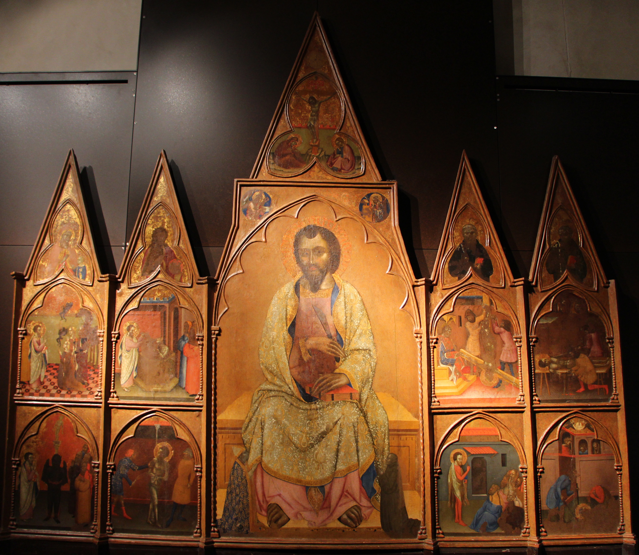 Museo Diocesano (Genoa) The making of this document was supported by Wikimedia CH. (Submit your project!) For all the files concerned, please see the category Supported by Wikimedia CH.